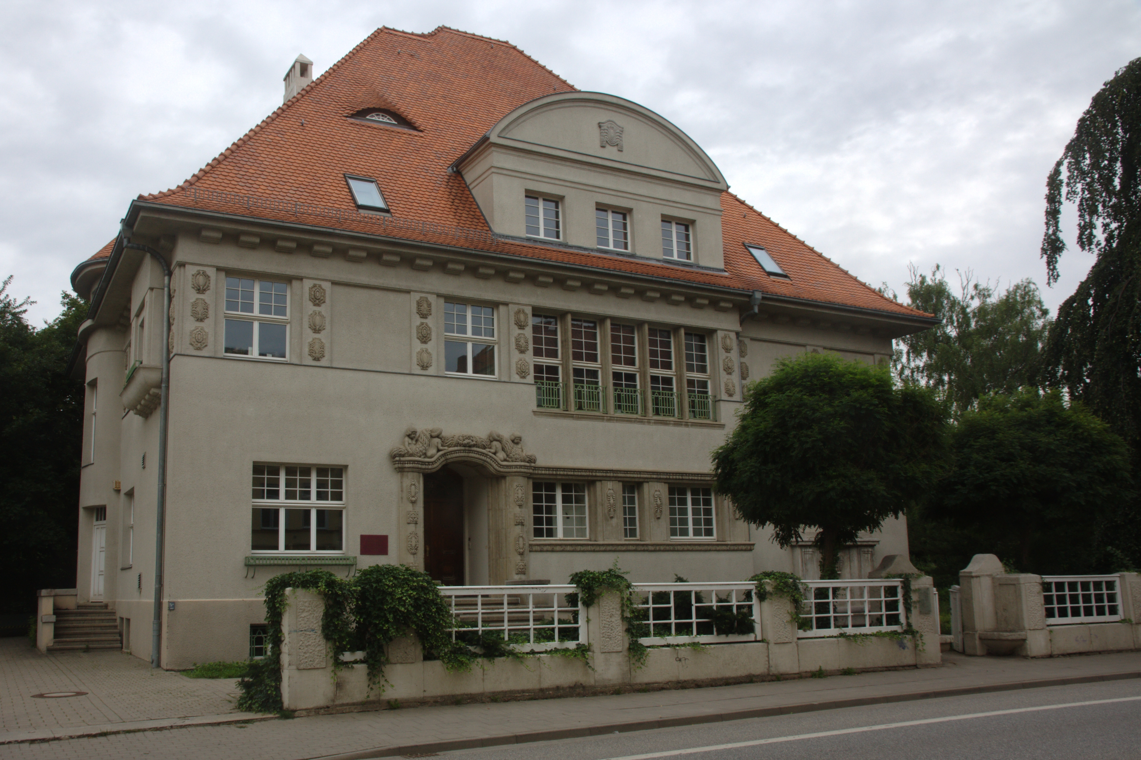 ehemalige Villa Zeeck, August-Bebel-Straße 55 in Rostock, unter Denkmalschutz